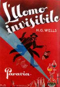 Copertina di edizione italiana del romanzo L'uomo invisibile di H. G. Wells, Stamperia Reale G. B. Paravia & C., 1925.